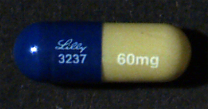 Cymbalta 60mg